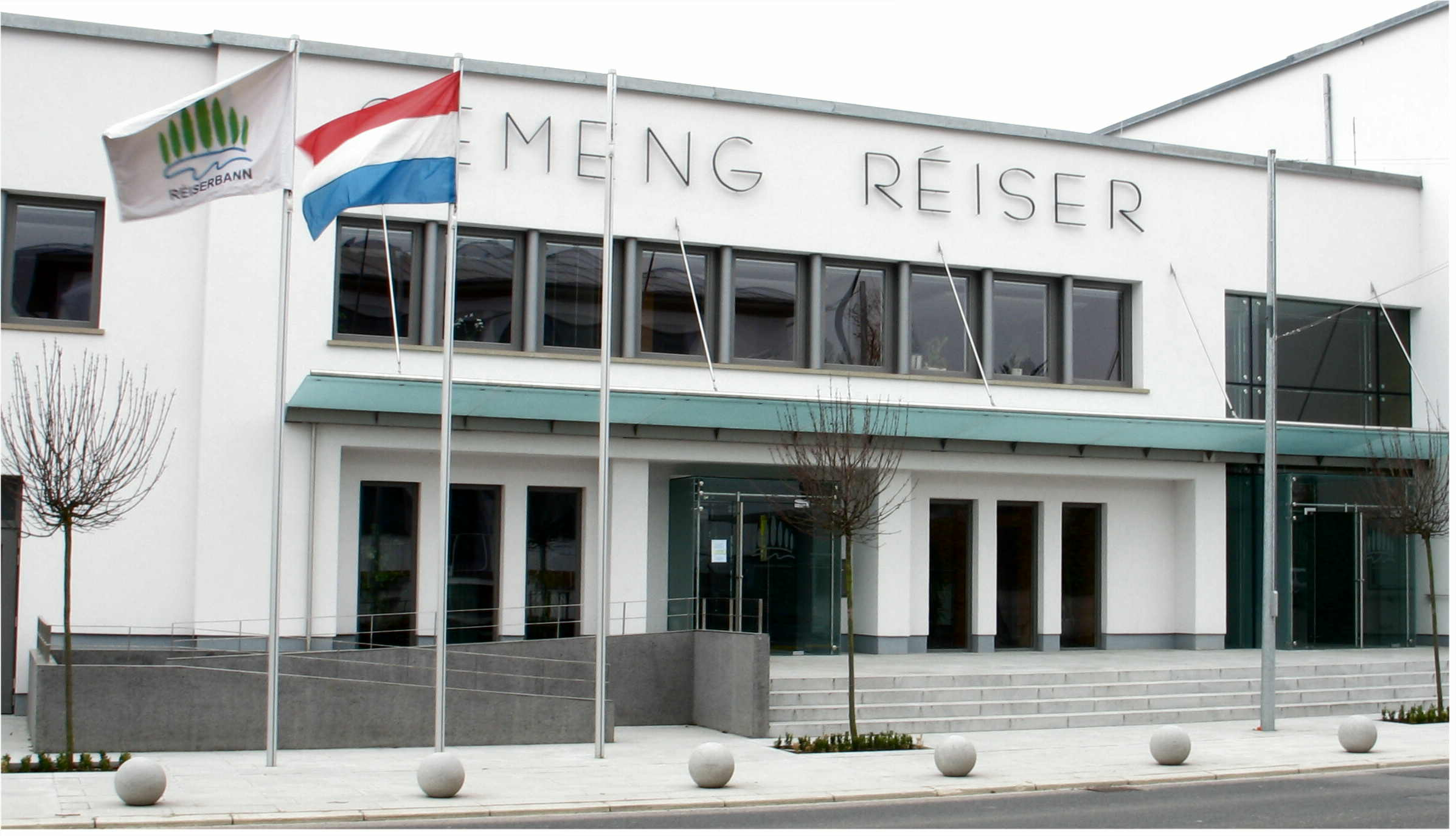 Sujet : Gemeng vu Réiser Source : Eege Foto lb: :lb :User : Johnny Chicago Lizenz : GFDL